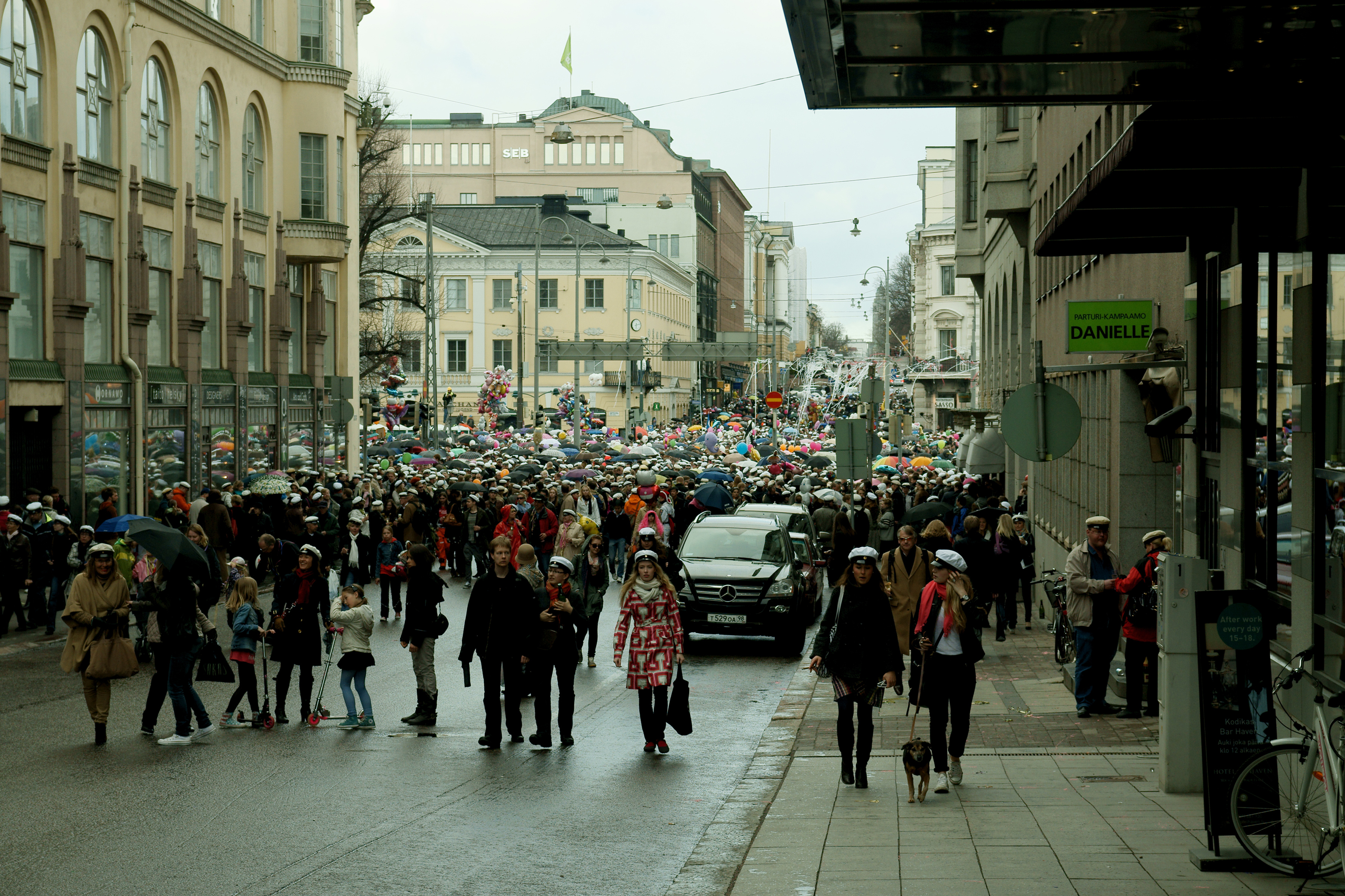 Kauppatori täynnä vappua juhlivia ihmisiä Mantan lakituksen jälkeen vappuna 2011.